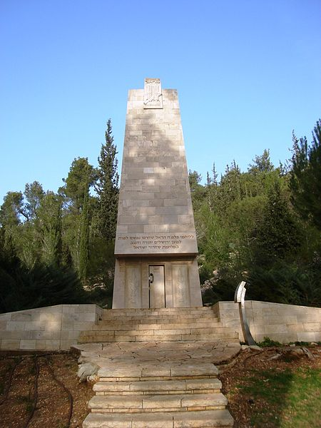 בבית הקברות הצבאי בקריית ענבים